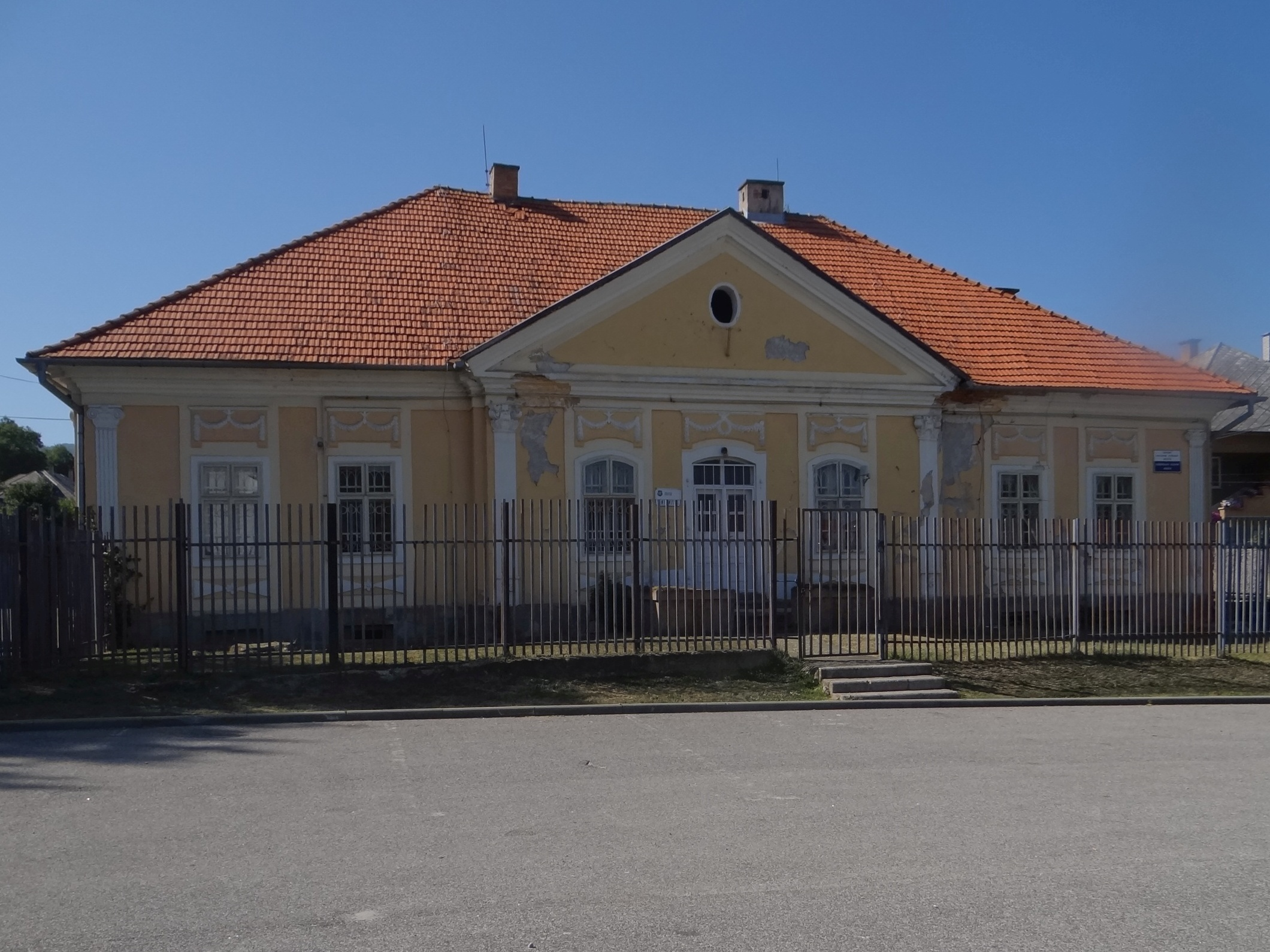 Brzotín